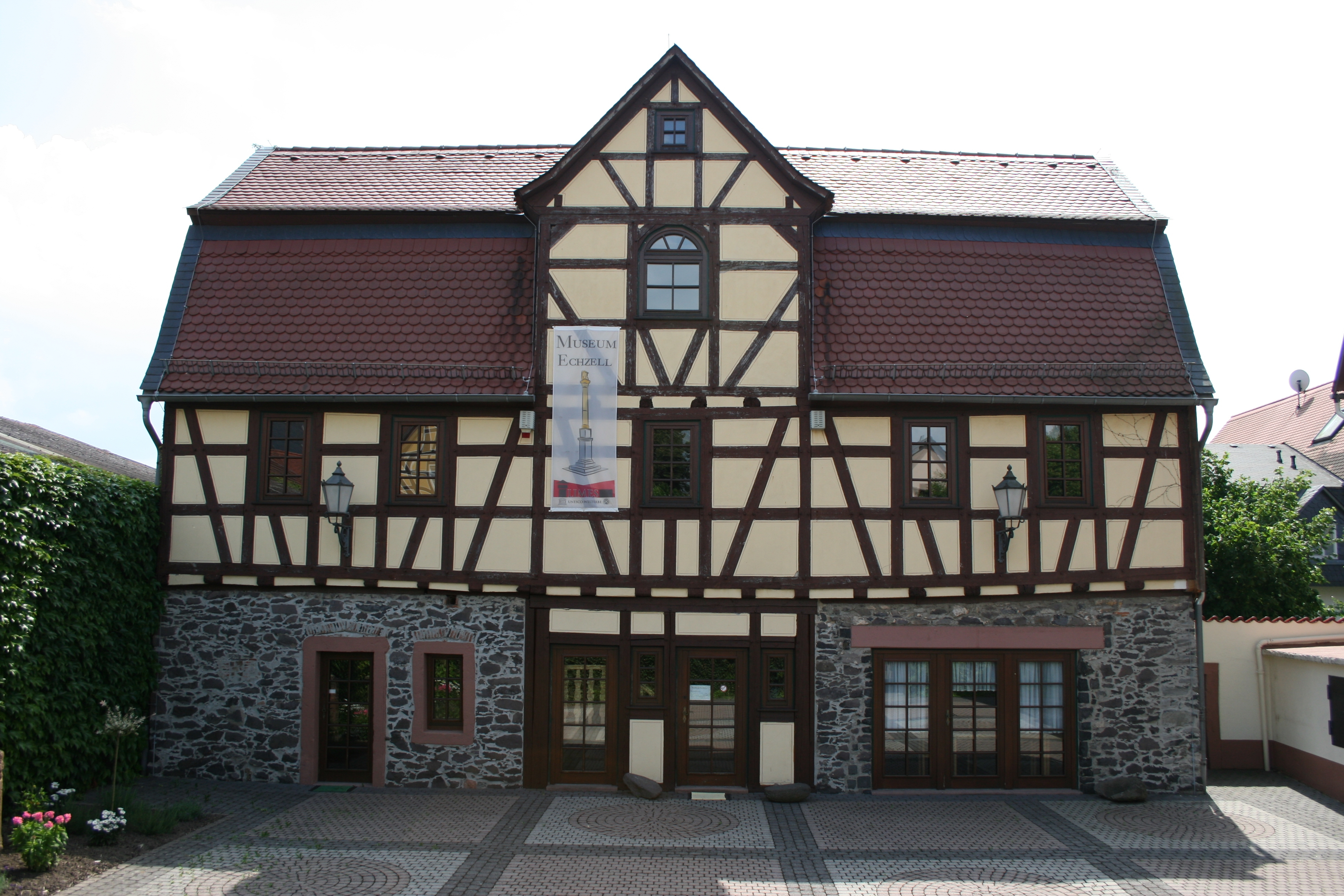 Das Heimatmuseum in Echzell, Wetteraukreis, Hessen.